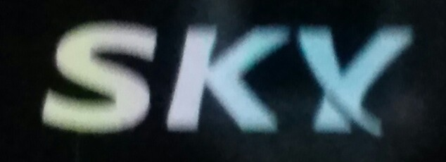 스카이 (휴대전화) 로고